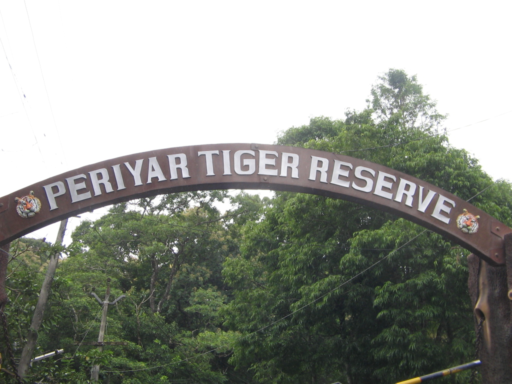 periyar tiger reserve entrance